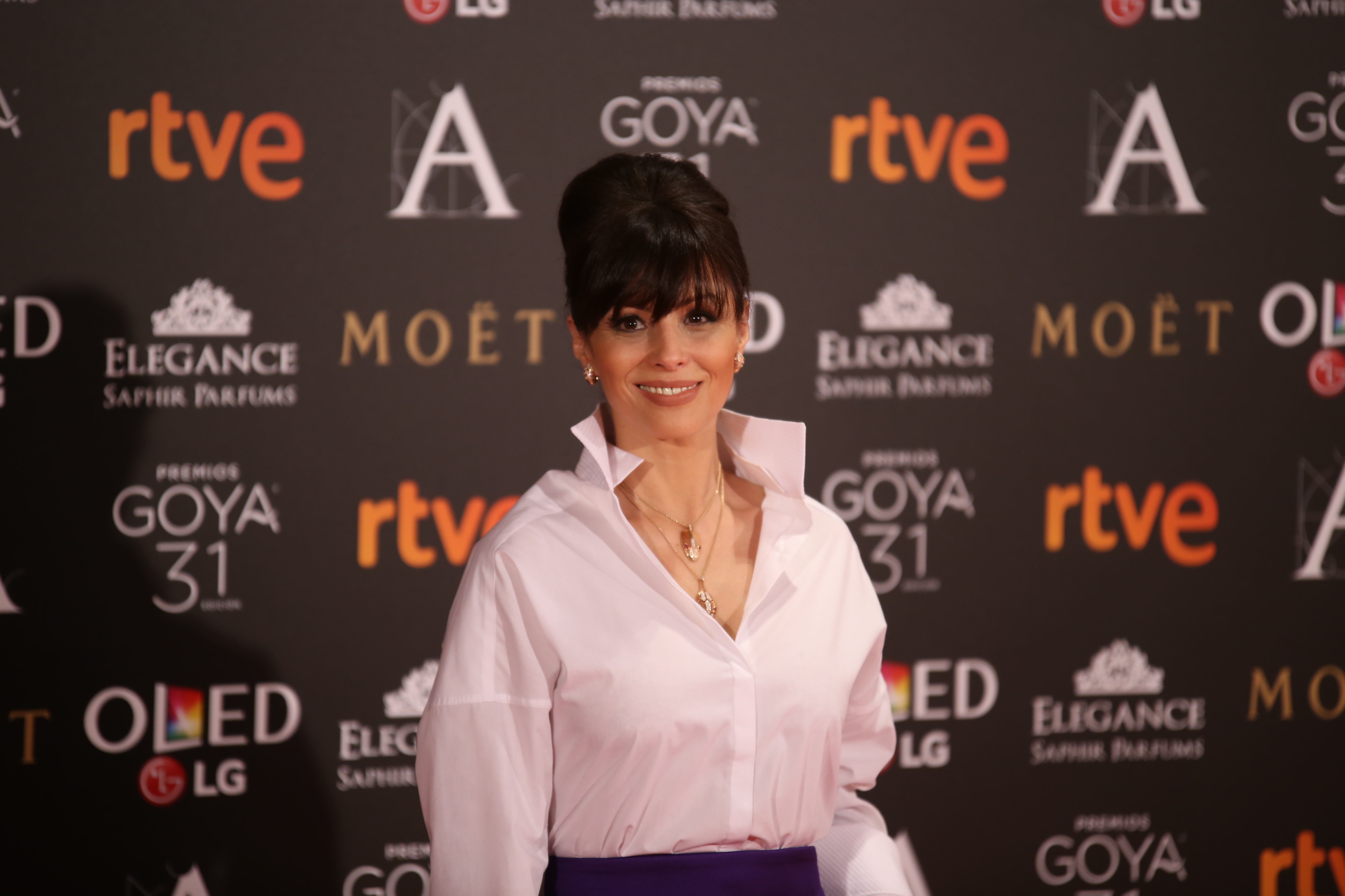 Premios Goya 2017